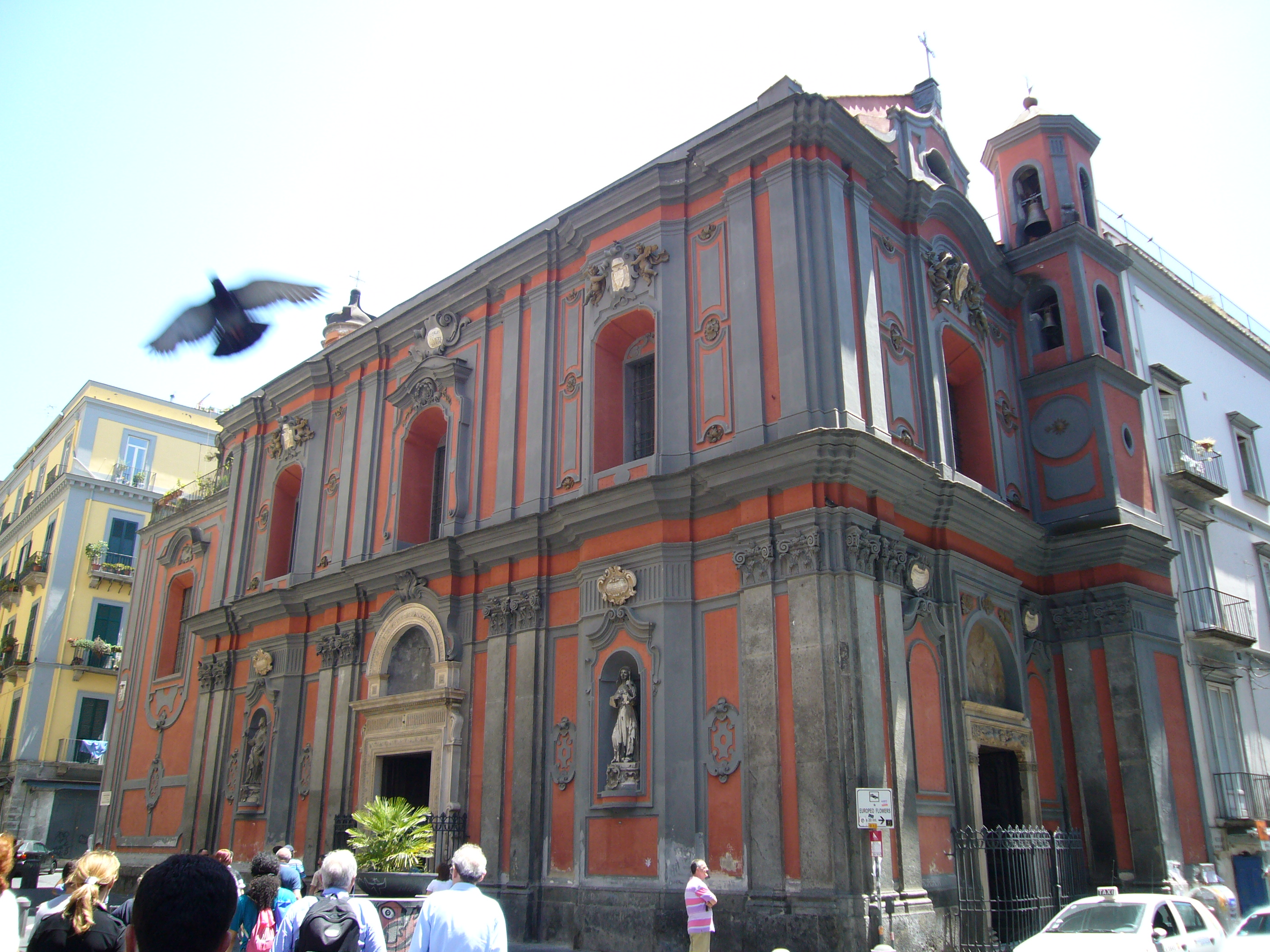 Napoli, Sant'Angelo a Nilo: facciata